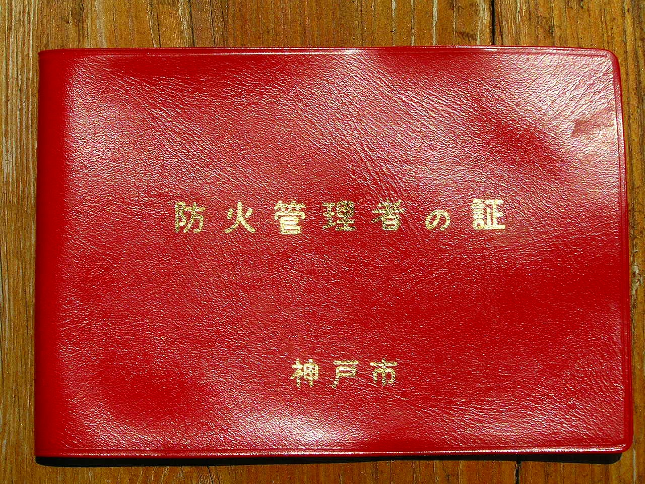 1980年（昭和55年）発行 神戸市防火管理者の証表紙